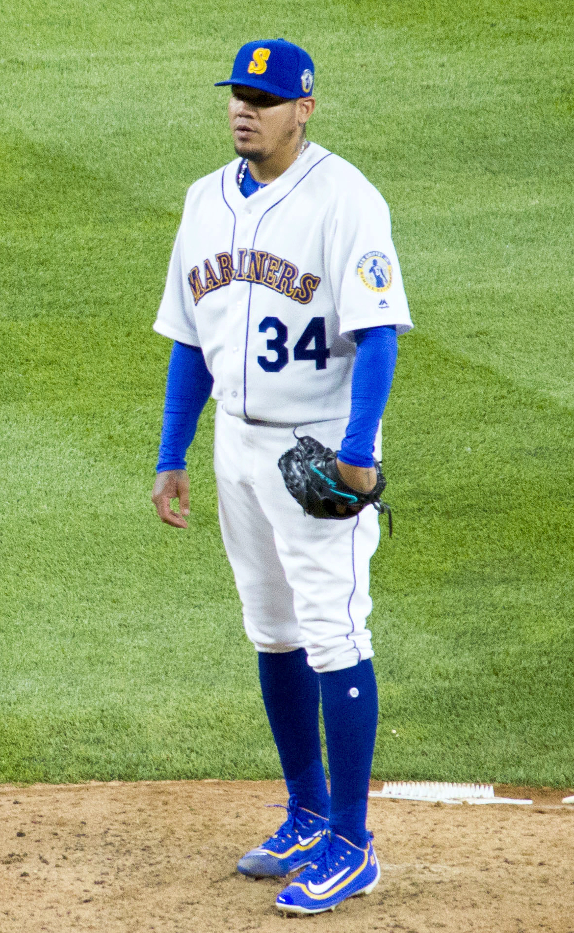 Félix Hernández